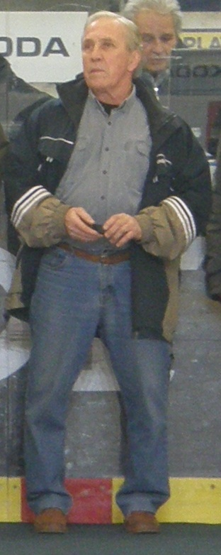 Josef Černý, bývalý hokejista (* 1939), při křtu knihy Kometa - příběh hokejového klubu v Kajot aréně